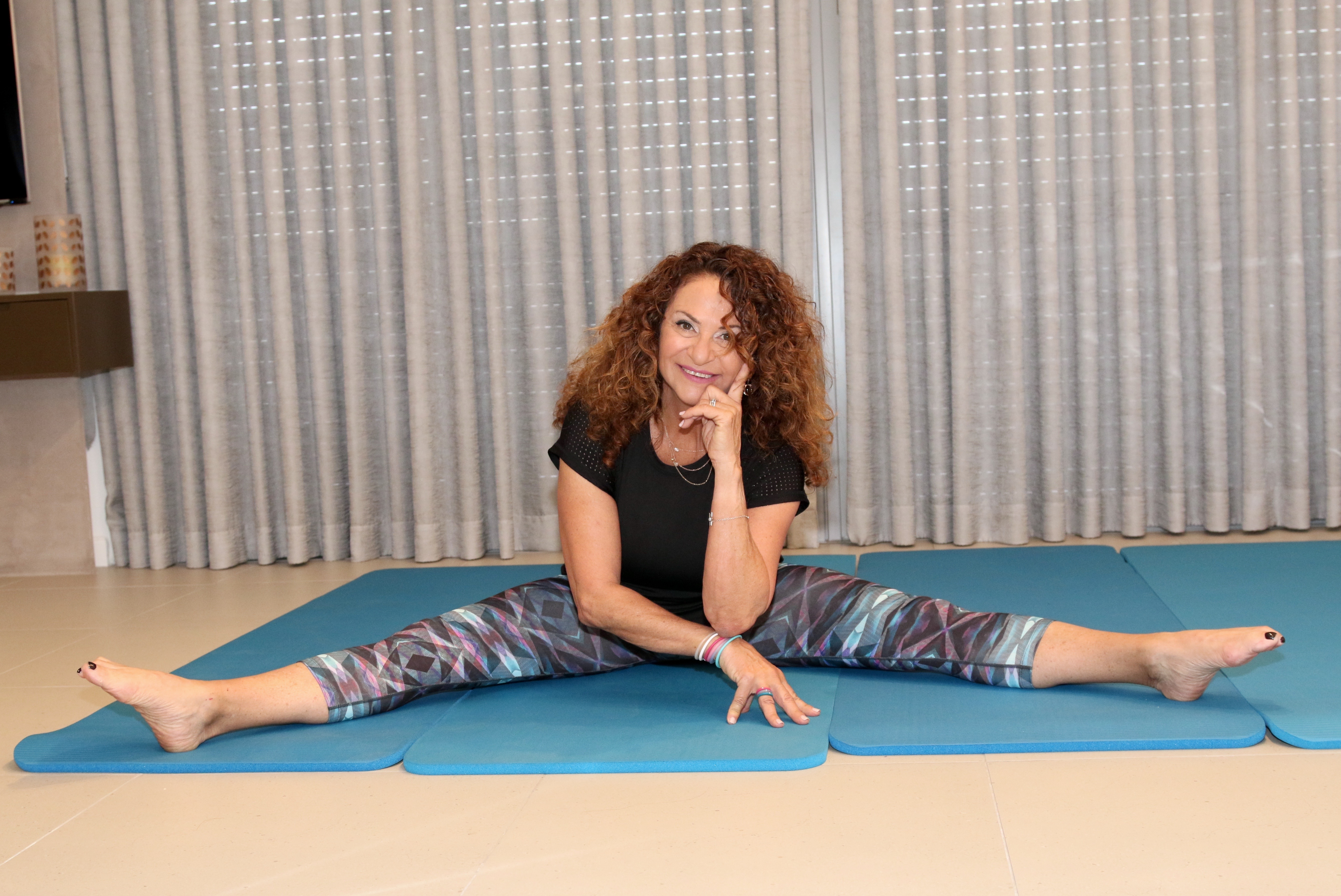 דליה מנטבר בצילומים 2017